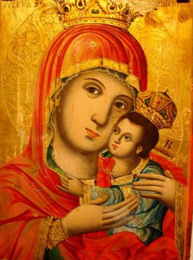 Икона “Богородица Слаткољубештаја“, 1856, автор Дичо Зограф, Забелски манастир, с.Никуљане